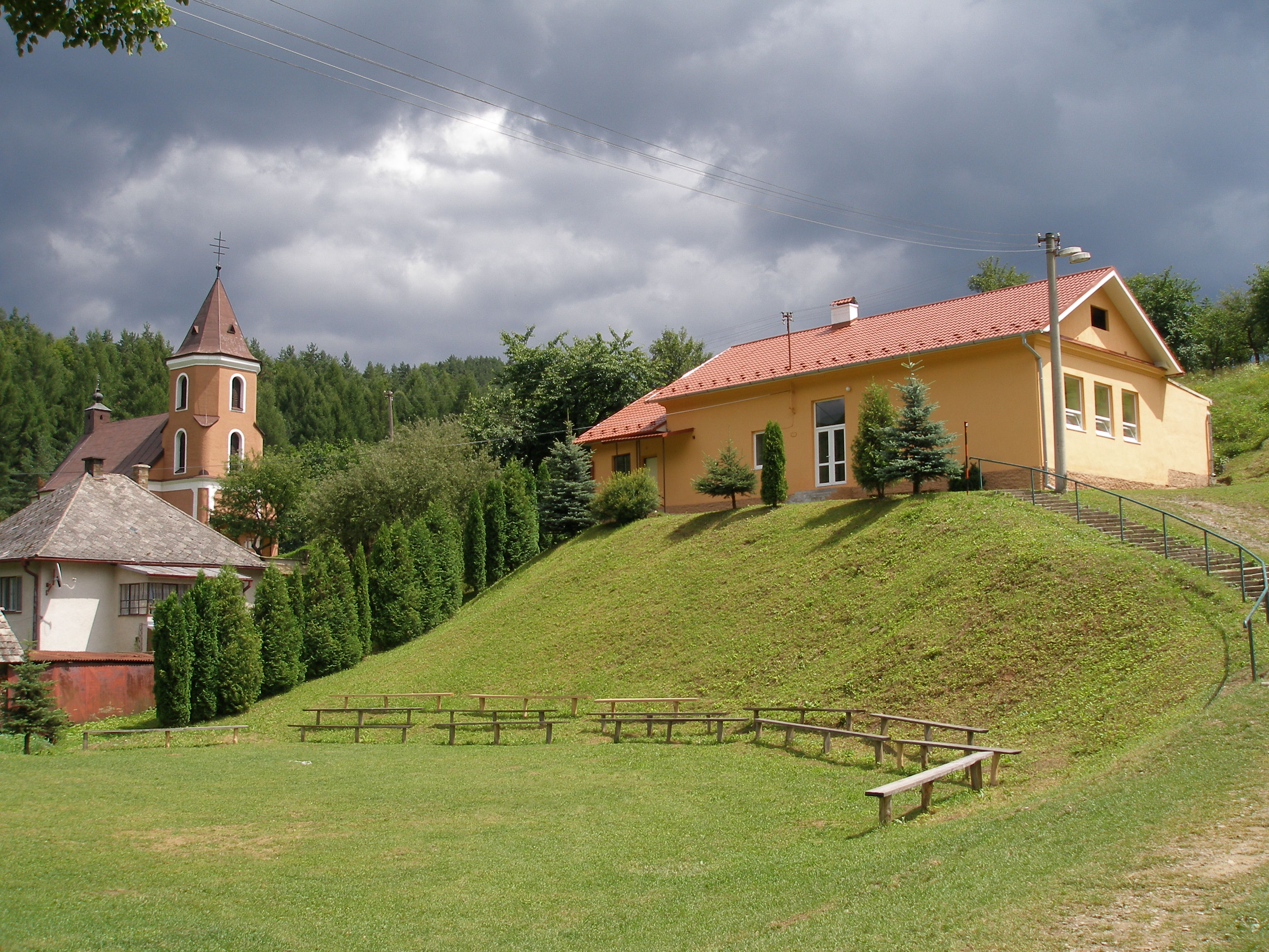 Kvačany obec v Šarišskej vrchovine, okr.Prešov, región Šariš